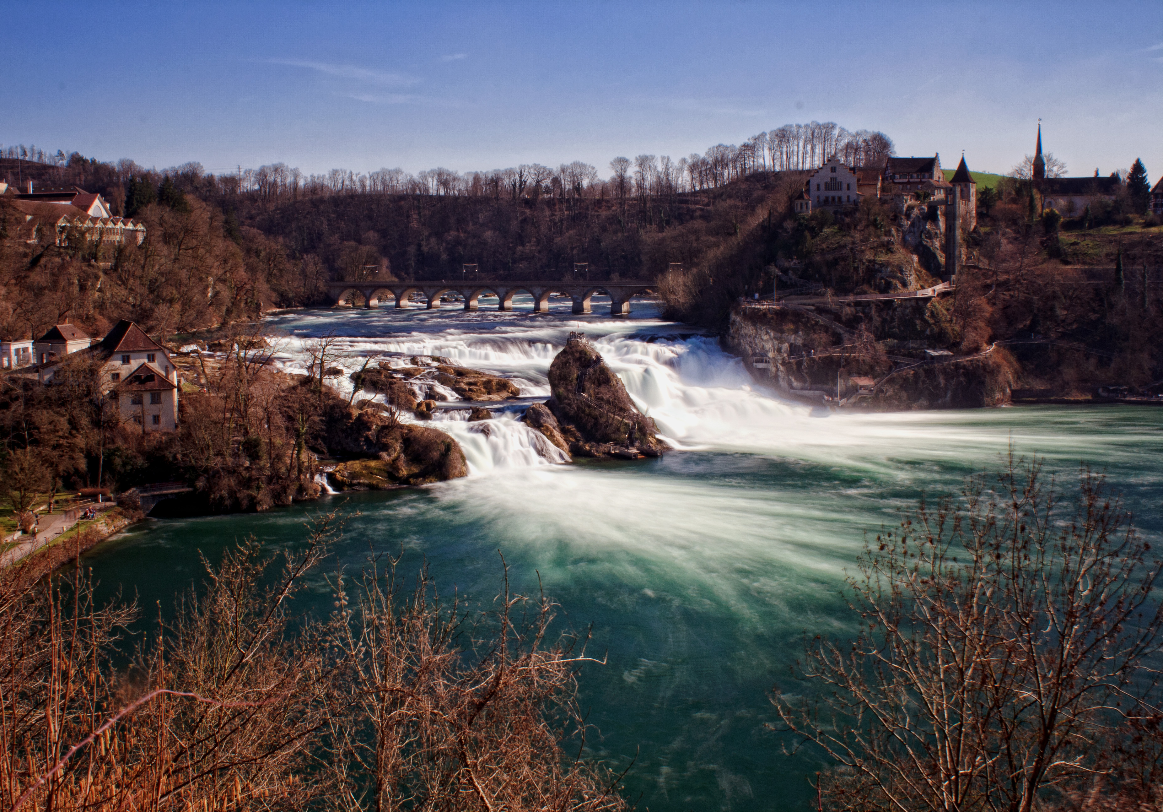 Rheinfall